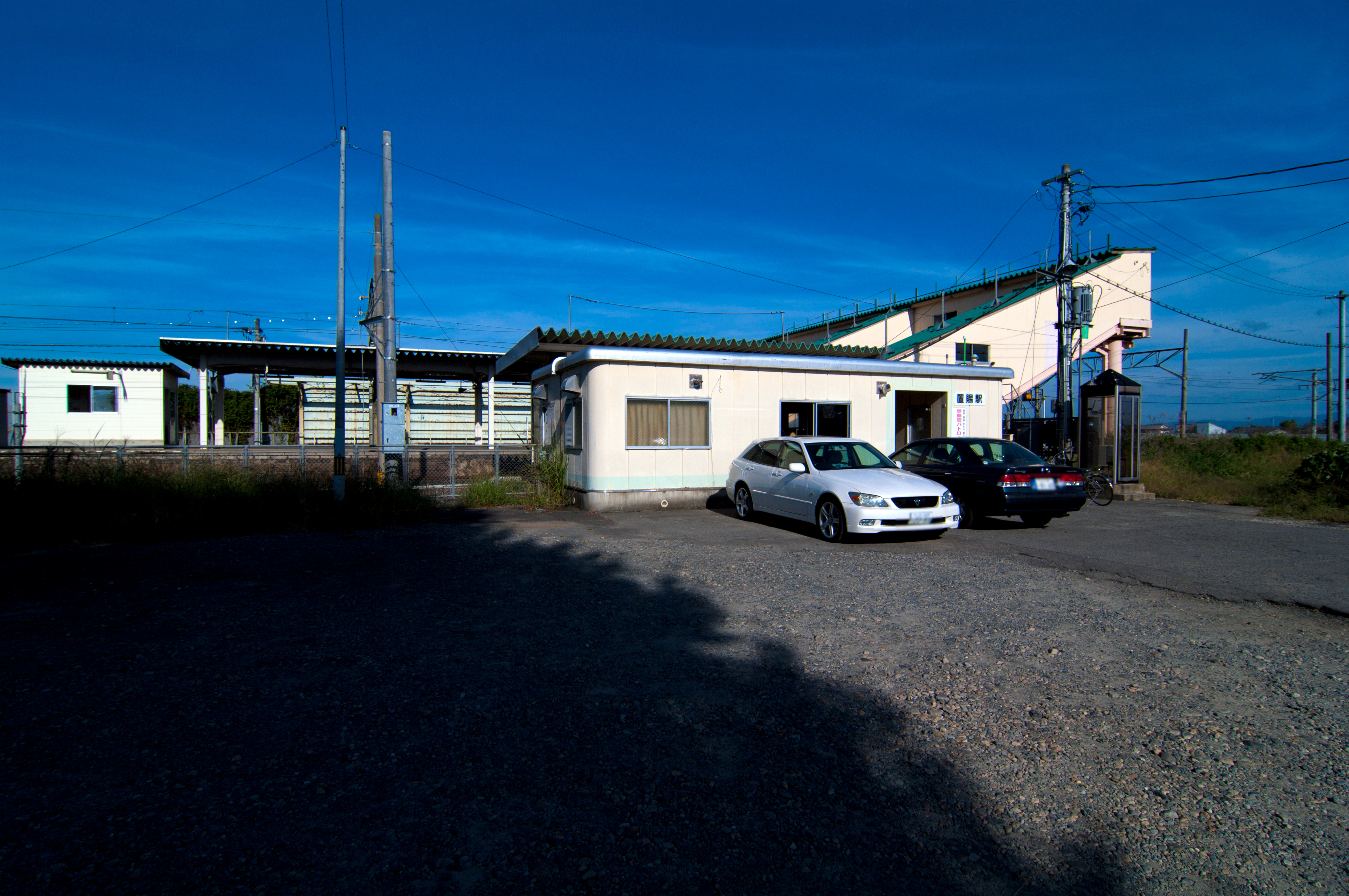 東日本旅客鉄道奥羽本線置賜駅